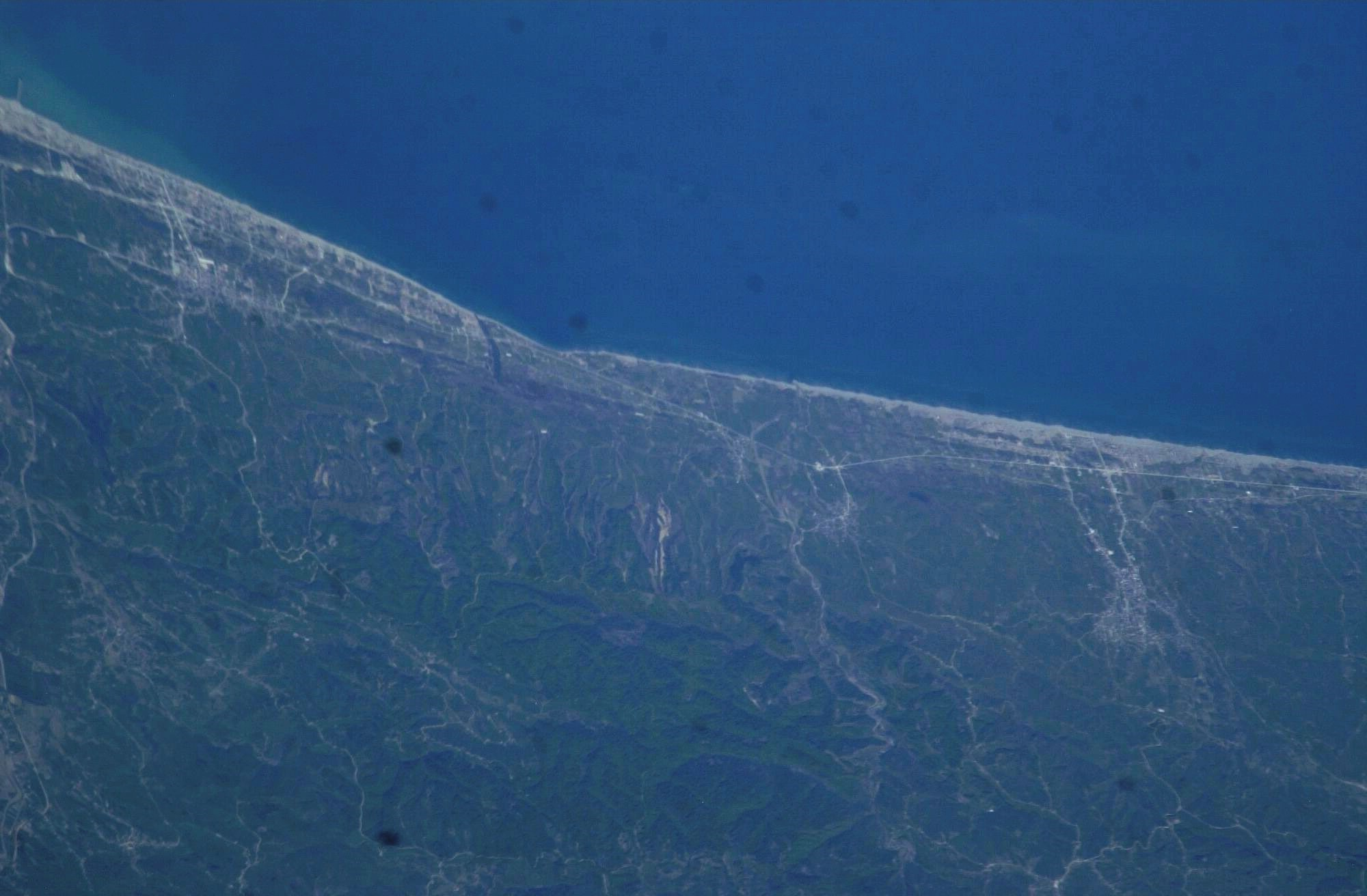 Kocaali ve Karasu'nun 2003.05.02 tarihinde NASA tarafından 382 km yükseklikten çekilmiş fotoğrafı.